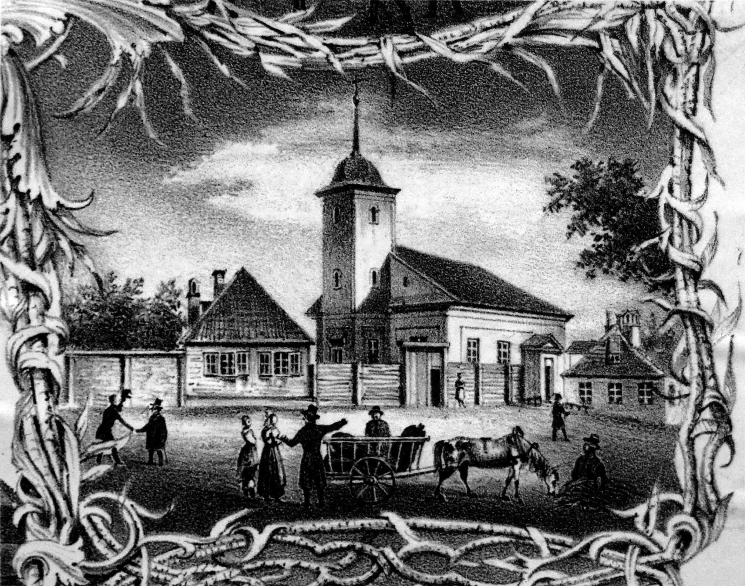 Кирха св. Михаила в Нарве. Гравюра.